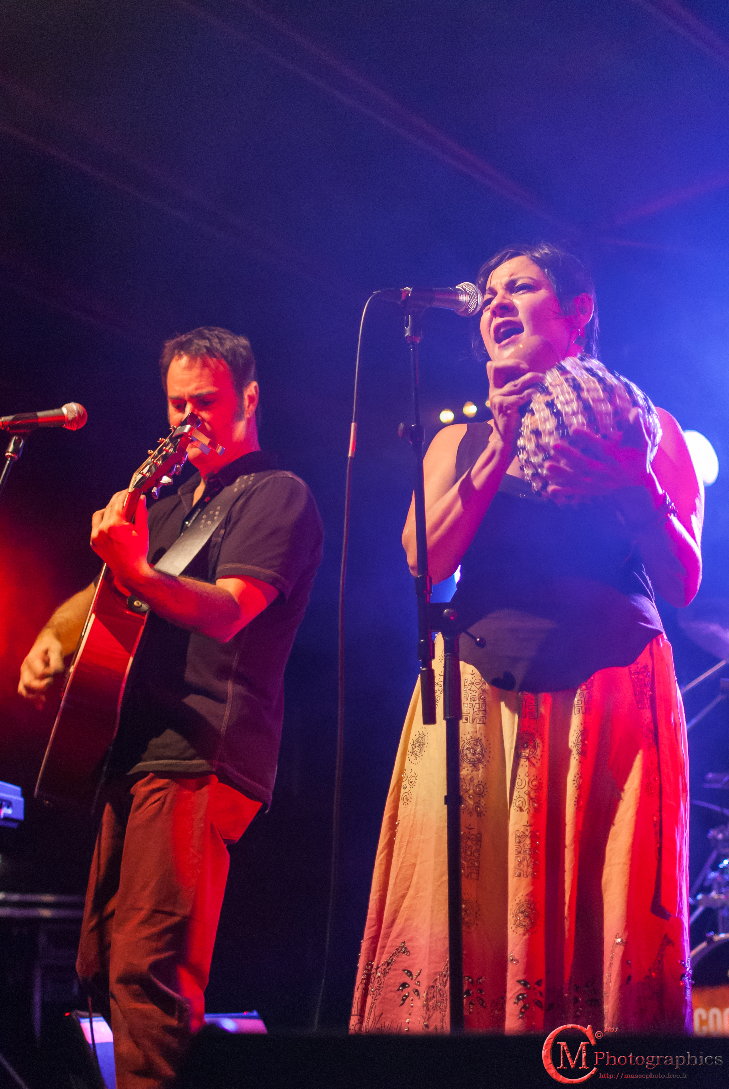 Concert de Cock Robin au Festival Montagne et Music. Peter Kingsbery et Anna LaCazio.